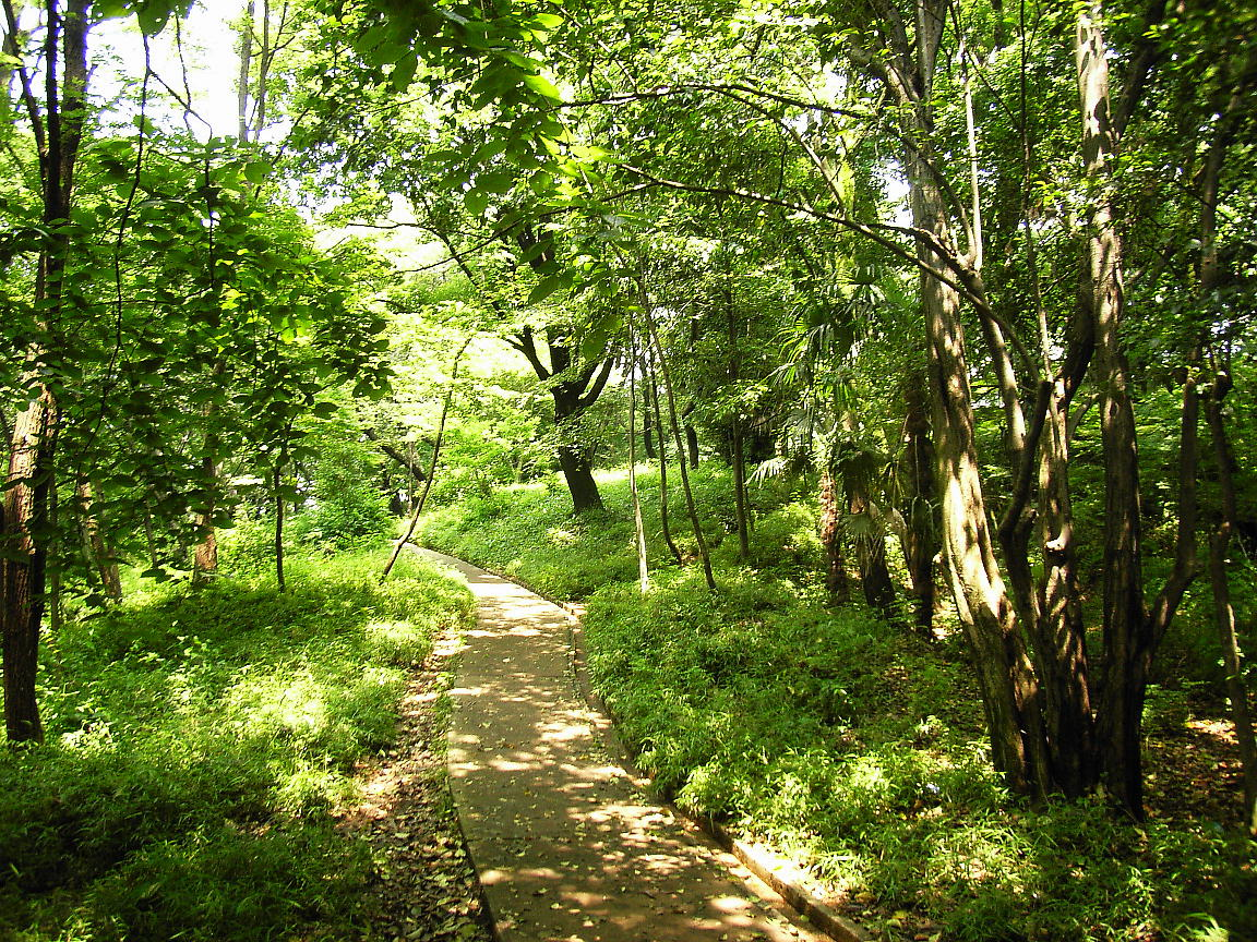 Mount Hakone in the Toyama Park. Shinjuku, Tokyo, Japan.